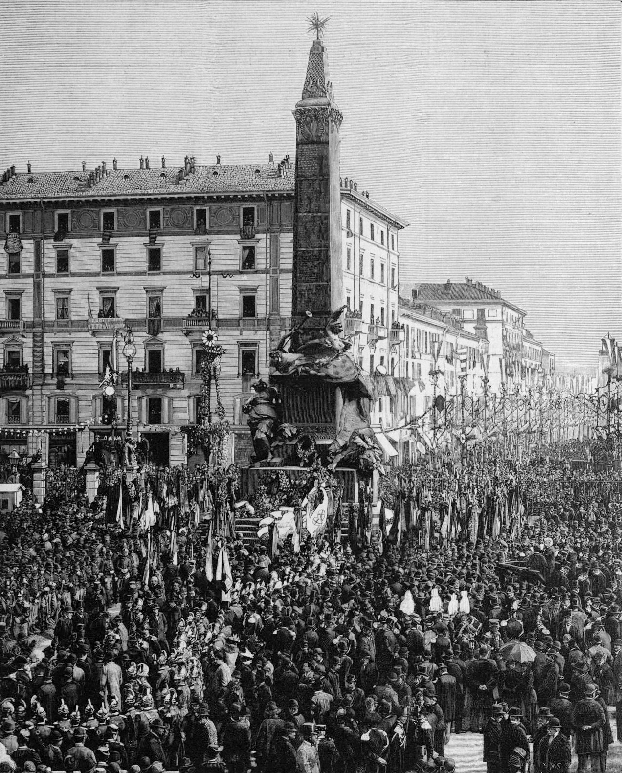 Monumento alle Cinque Giornate - Inaugurazione